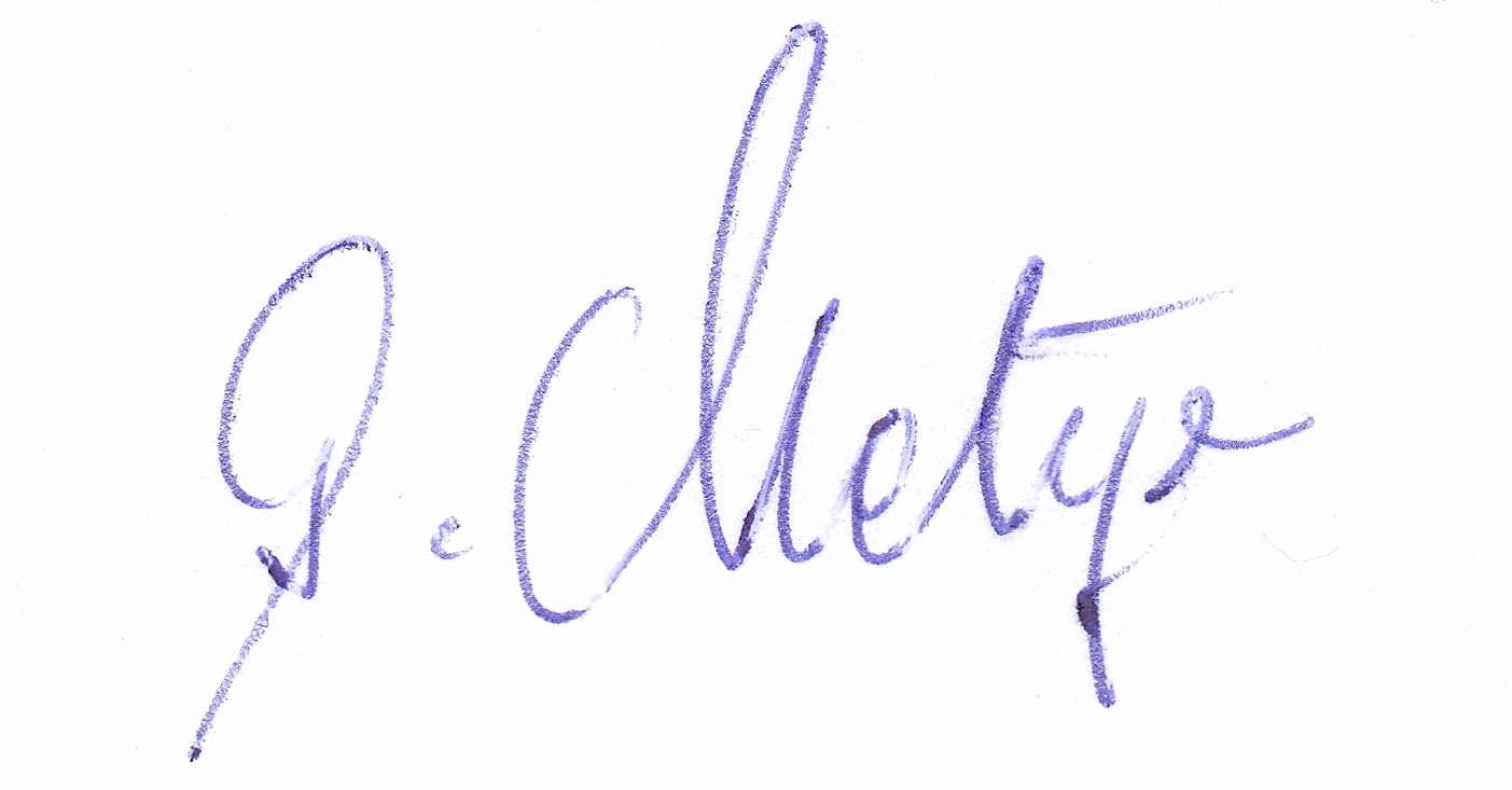 Autogramm des ehem. Bundesliga-Spielers von 1978